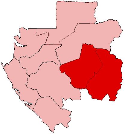 Mappa della diocesi cattolica di Franceville, in Gabon.